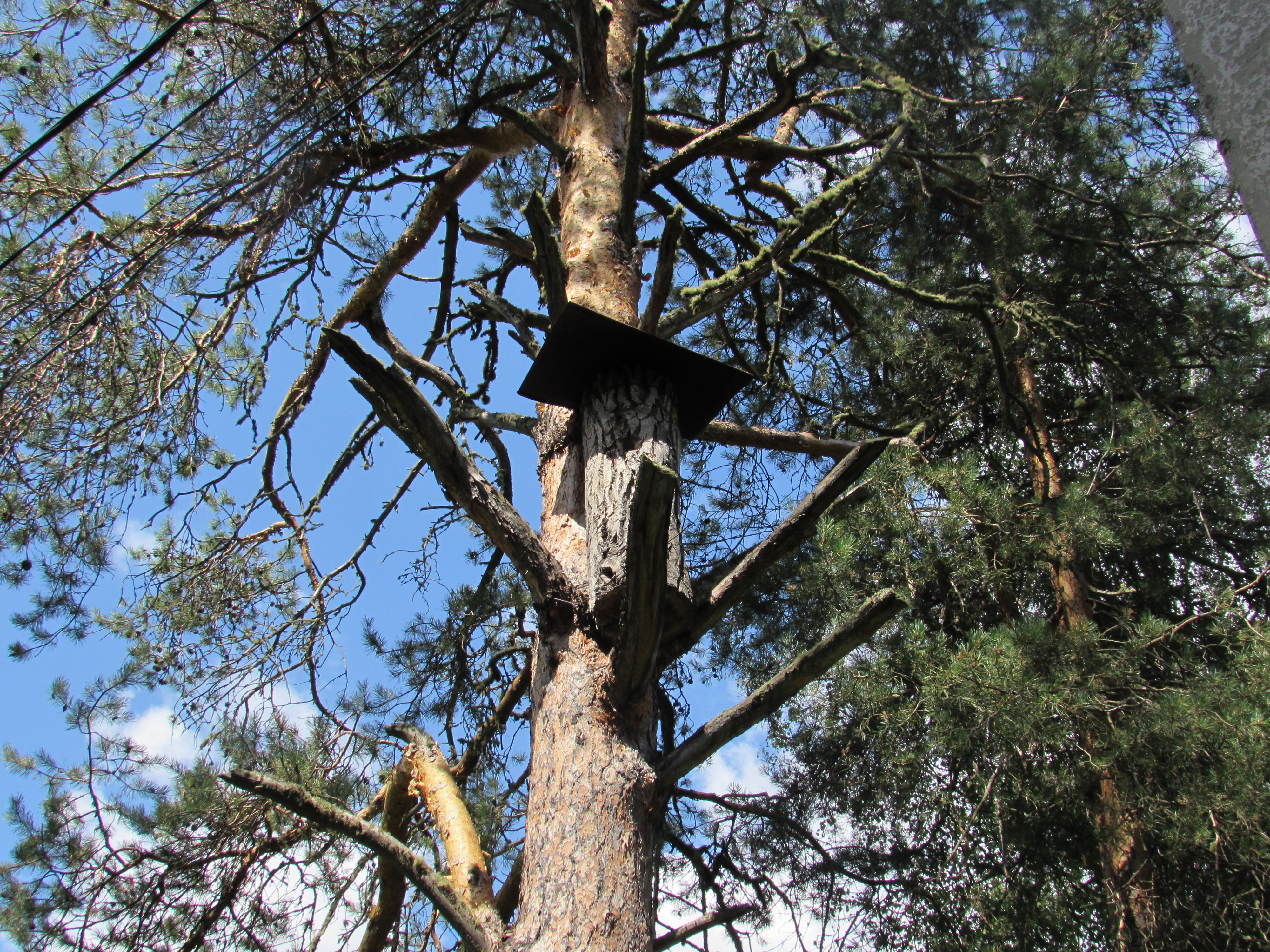 Башҡортса: Башҡорт викимедиасыларының Шүлгәнташҡа сәйәхәте